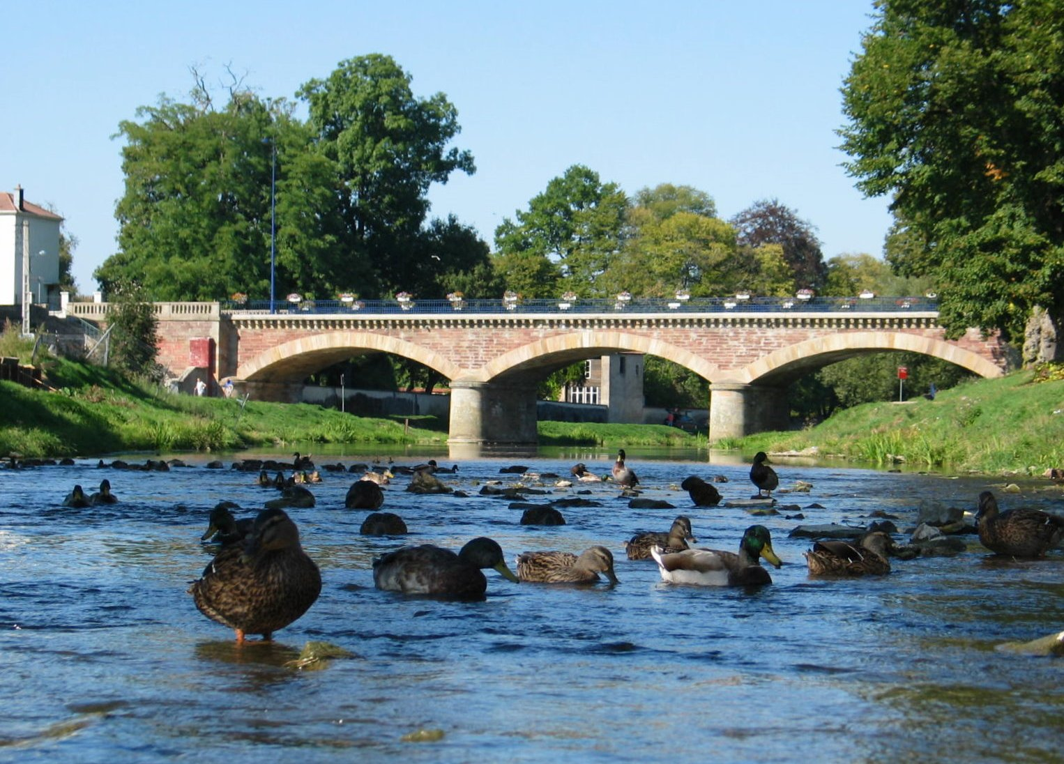 Vue sur la rivière Madon sur la commune de Mirecourt (France, département des Vosges).